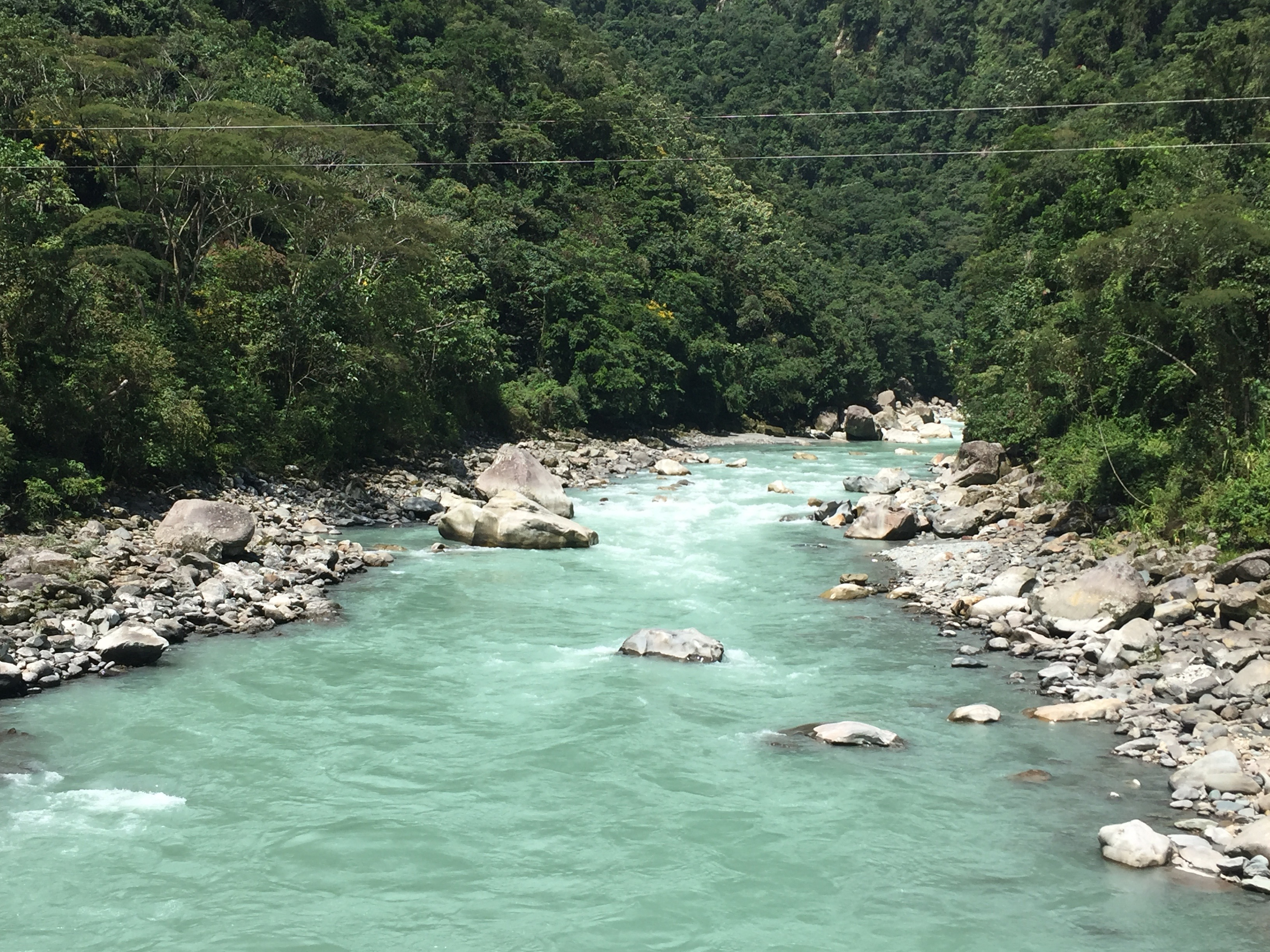 Esta fotografía fue tomada en el municipio colombiano con código 50313.